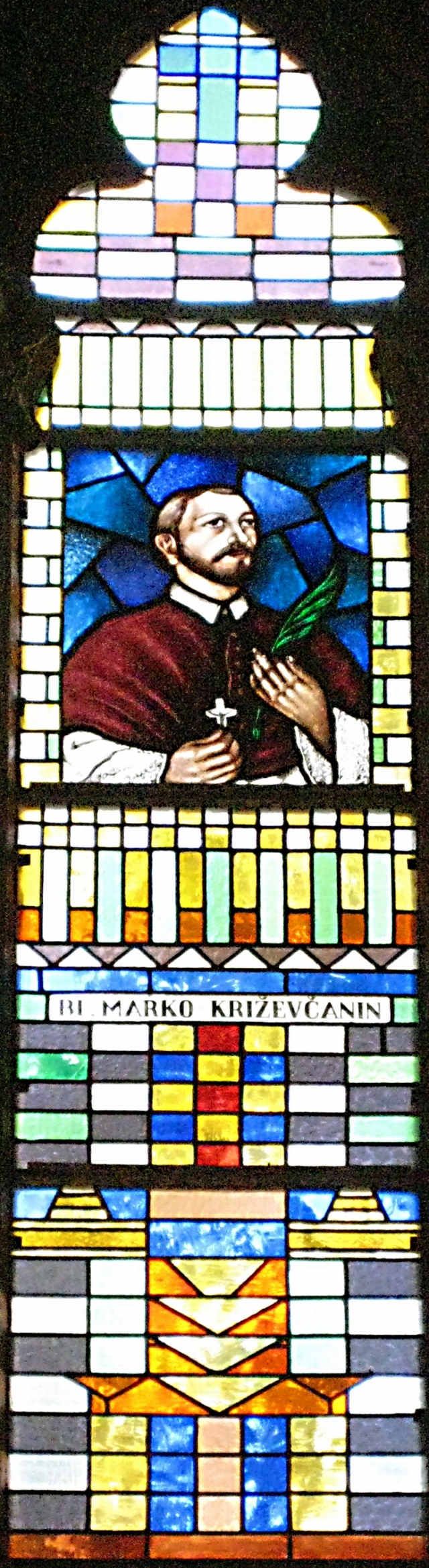 vitraj Sv. Marka Križevčanina u crkvi Gospe Lurdske, Rijeka